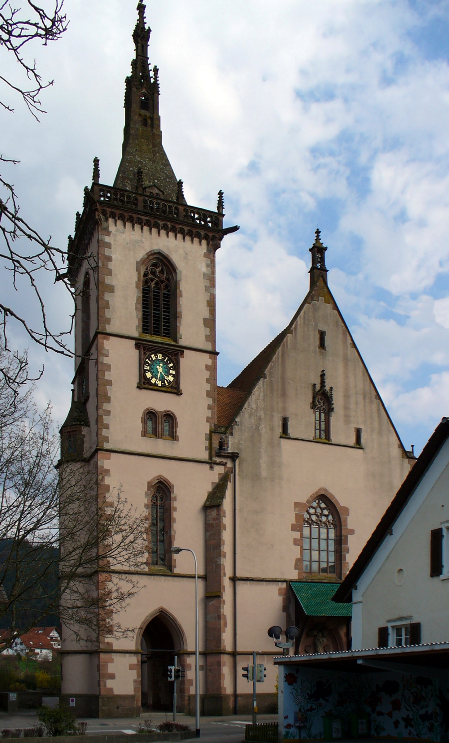 Retouched version of Image:Lautenbach Kirche1.jpg, which has the following description: Beschreibung / description: Wallfahrtskirche "Maria Krönung" in Lautenbach, Deutschland / Pilgrimage church "Maria Krönung" at Lautenbach, Germany Quelle / source: selbst fotografiert am / self made at 03. April 2005 Fotograf / photographer: User:Kerish Lizenz / licence